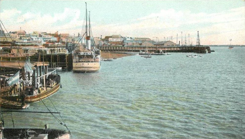 Vista del muelle en Rosario, Argentina, a principios de siglo XX.